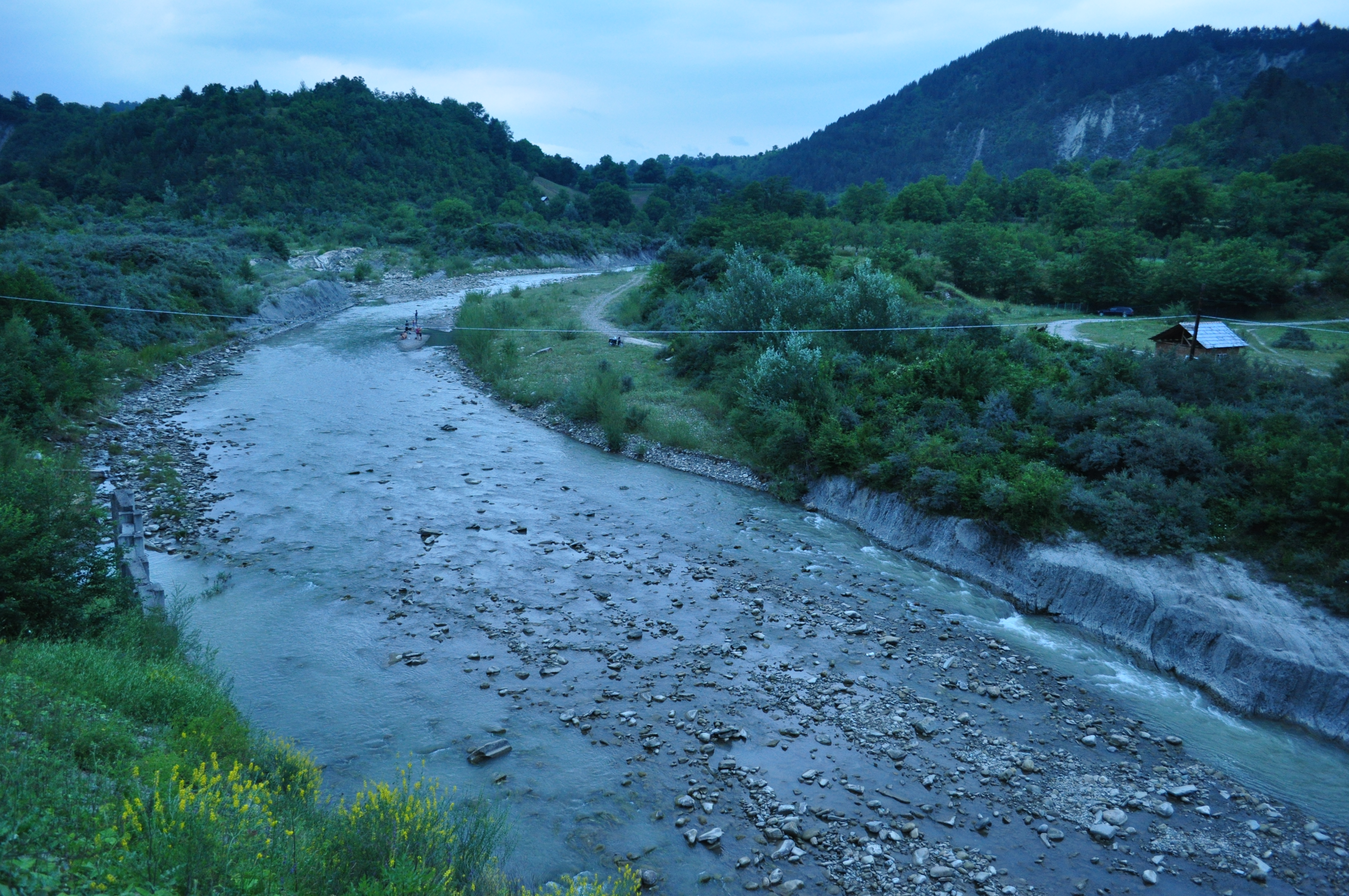 Vrâncioaia, județul Vrancea